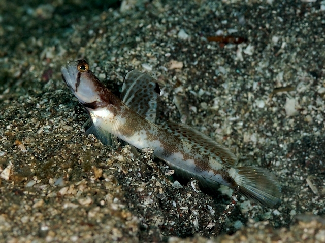 オニハゼ Tomiyamichthys oni